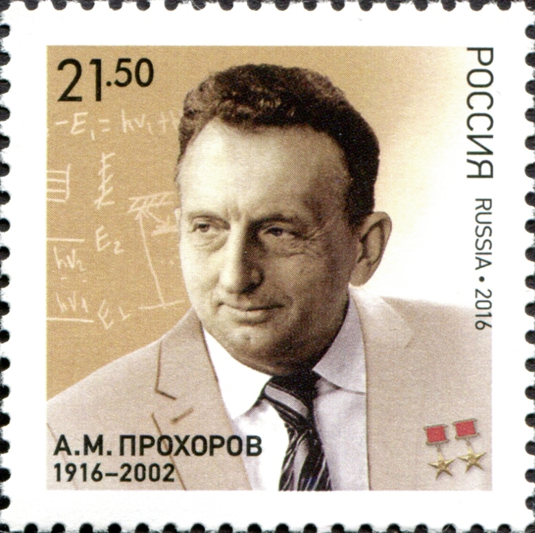 Почтовая марка России, выпущенная 22 сентября 2016 года, к 100-летию А. М. Прохорова. Портрет учёного, годы его жизни и доска с записями семинара 1964 года. Номер по каталогу ЦФА — 2143. Художник — Г. Щеголь. Тираж — 252000.